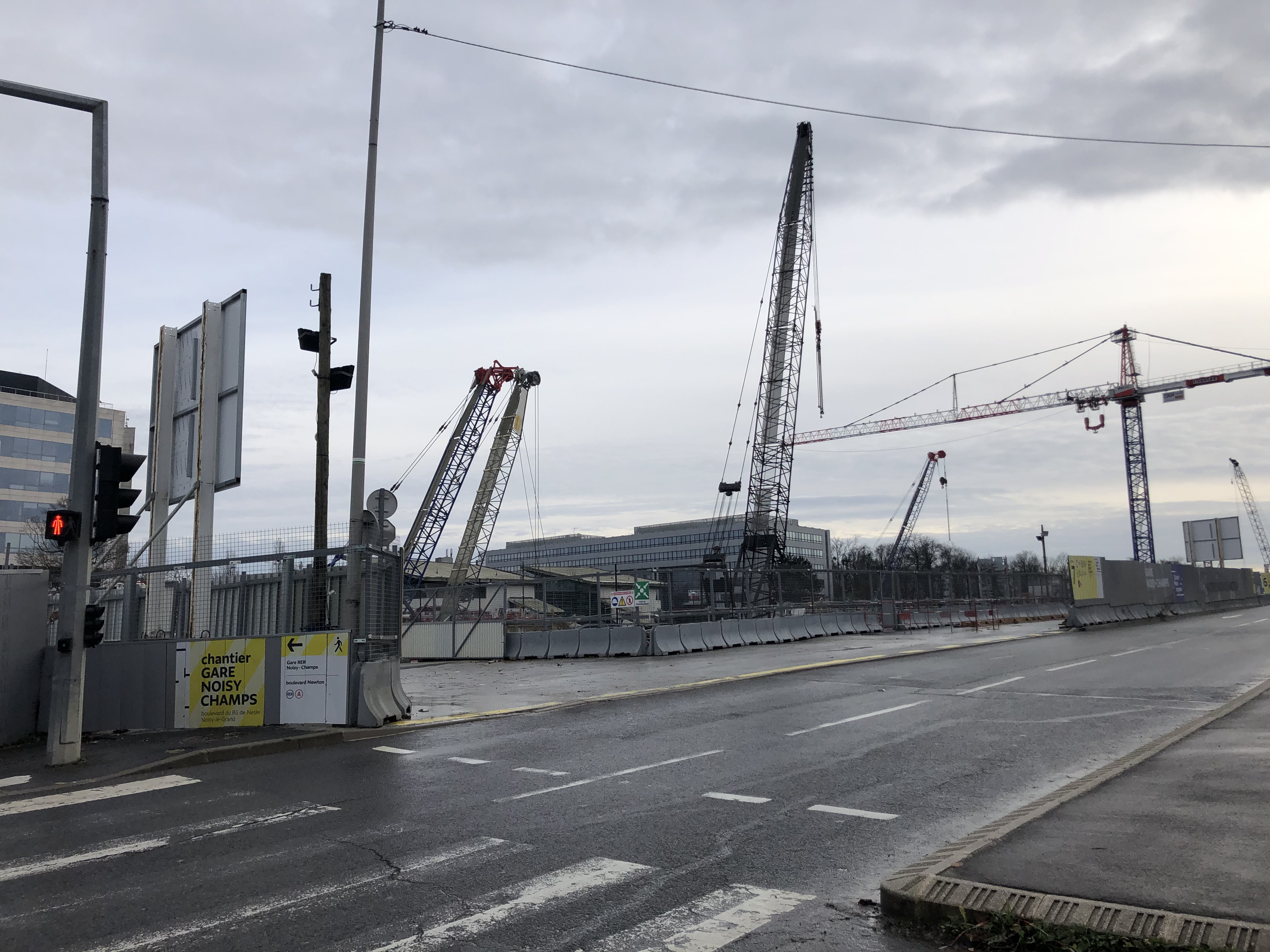 Chantier de la gare Noisy-Champs